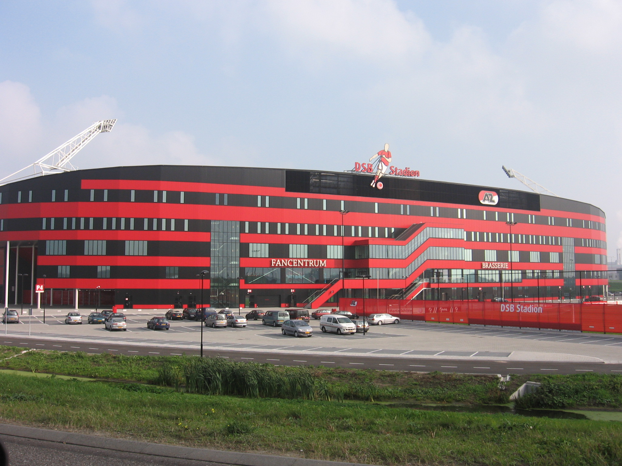 DSB stadion, Alkmaar, october 2006